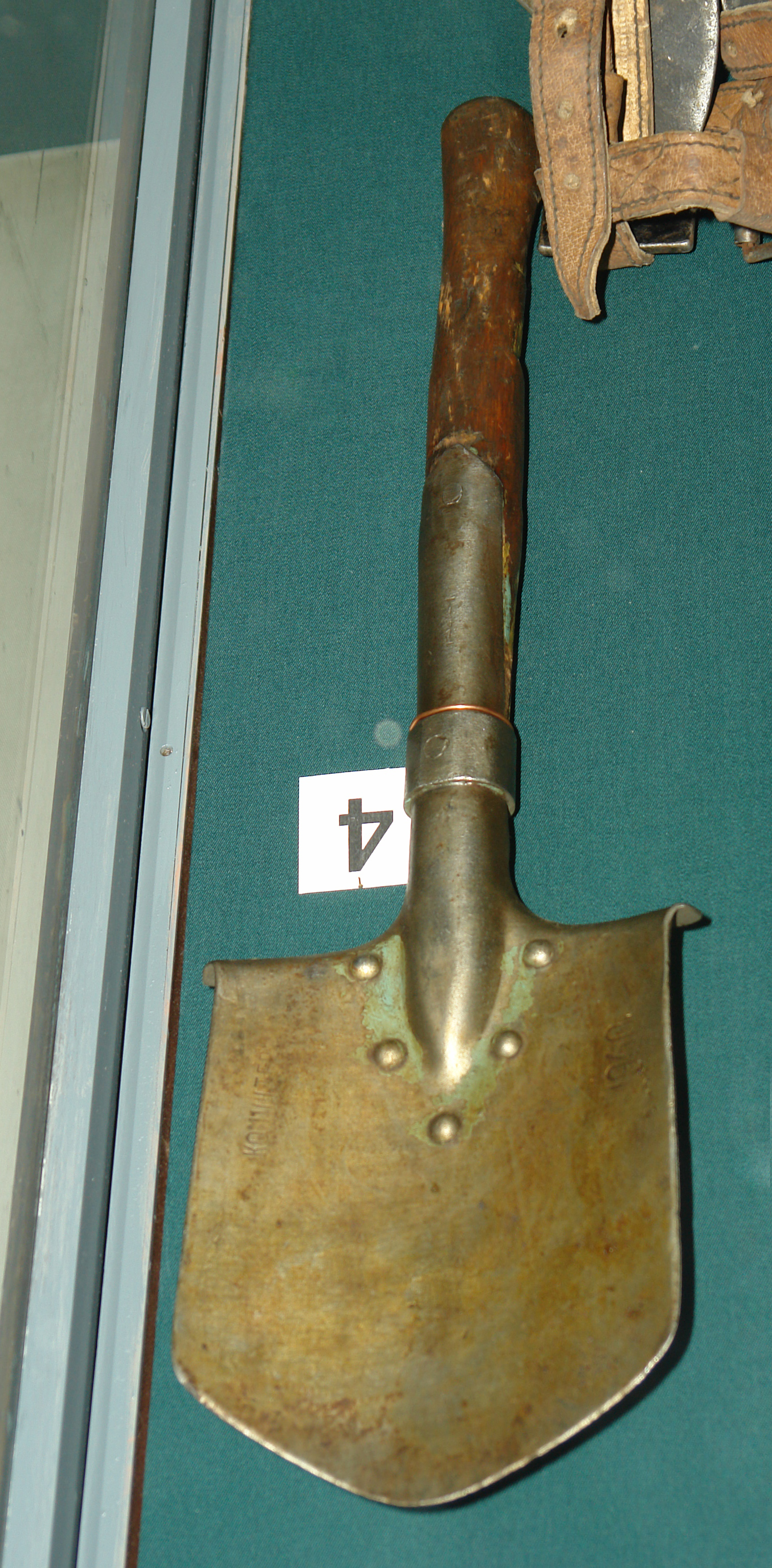 4. МАЛАЯ (ПЕХОТНАЯ) ЛОПАТКА обр. 1940 г. Военно-исторический музей артиллерии, инженерных войск и войск связи, Санкт-Петербург.